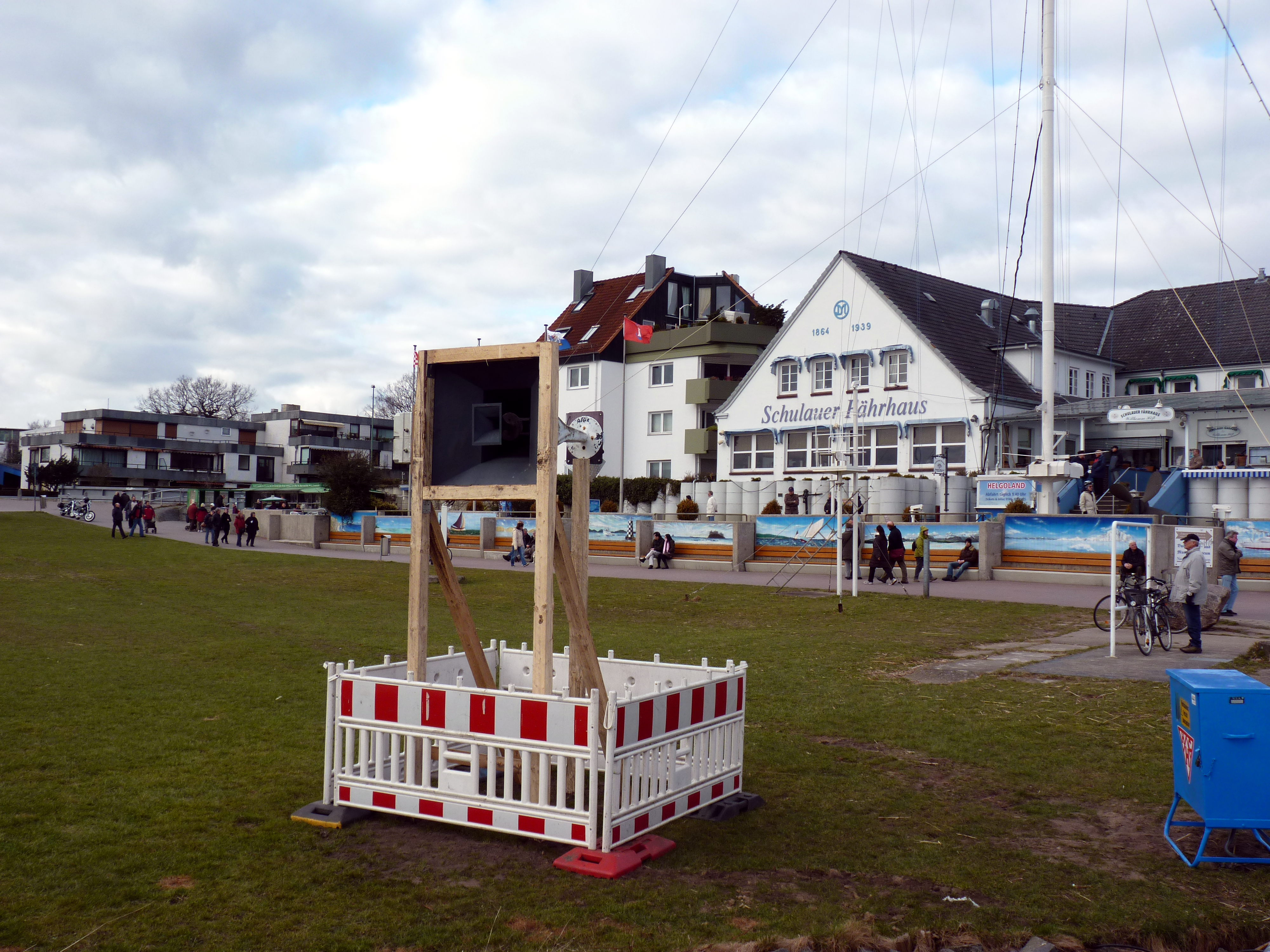 Willkommhöft, poste de salut des navires de Hambourg le plus célèbre du monde installé dans le "Schulauer Fährhaus" à Wedel. Chaque bateau de plus de 500 tonnes brutes qui passe sur l'Elbe est salué par un hymne national du pays correspondant.